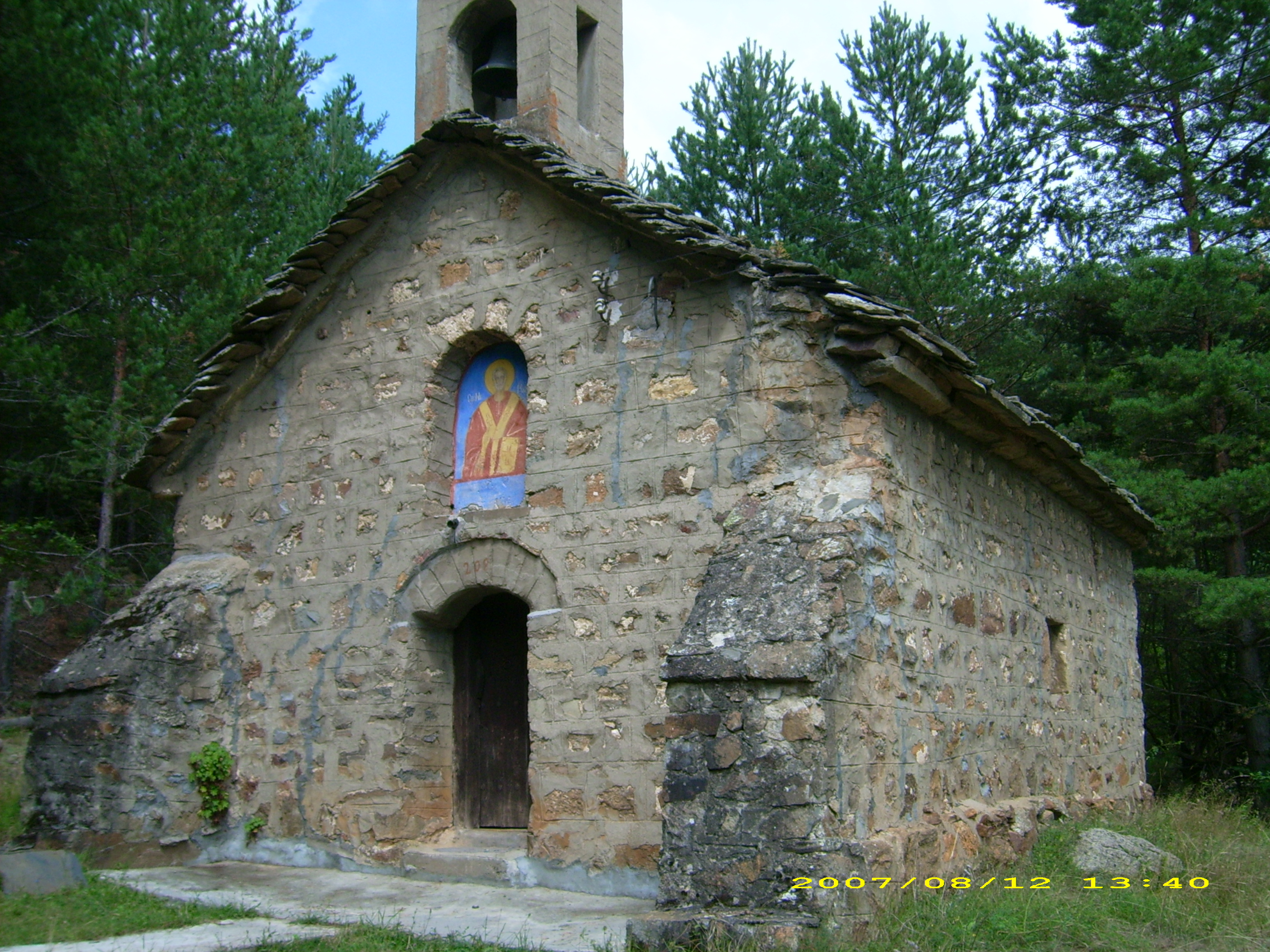 Средновековната църква "Св. Николай" в село Буковец, Софийско.